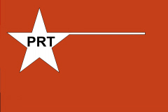 Bandera del Partido Revolucionario de los Trabajadores (Colombia)